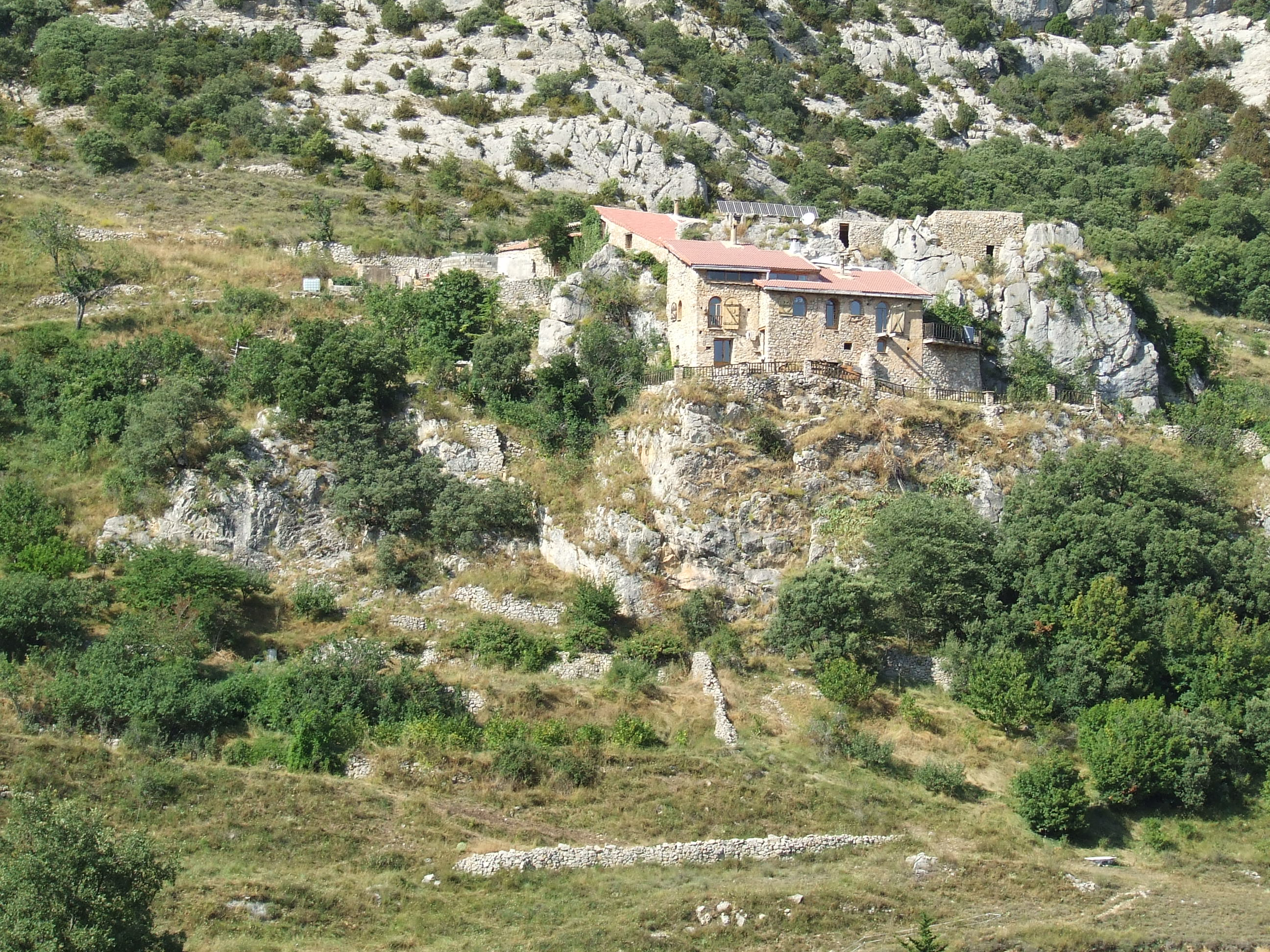 L'antic caseriu de Faidella, a la vall de Bóixols, del terme d'Abella de la Conca.